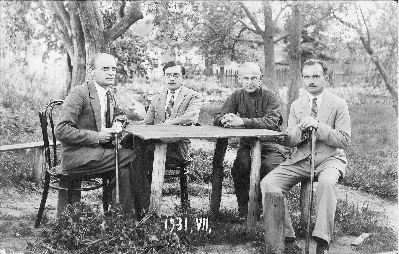 Настаўнікі Клецкай гімназіі. Другі злева - Мікалай Чарнецкі